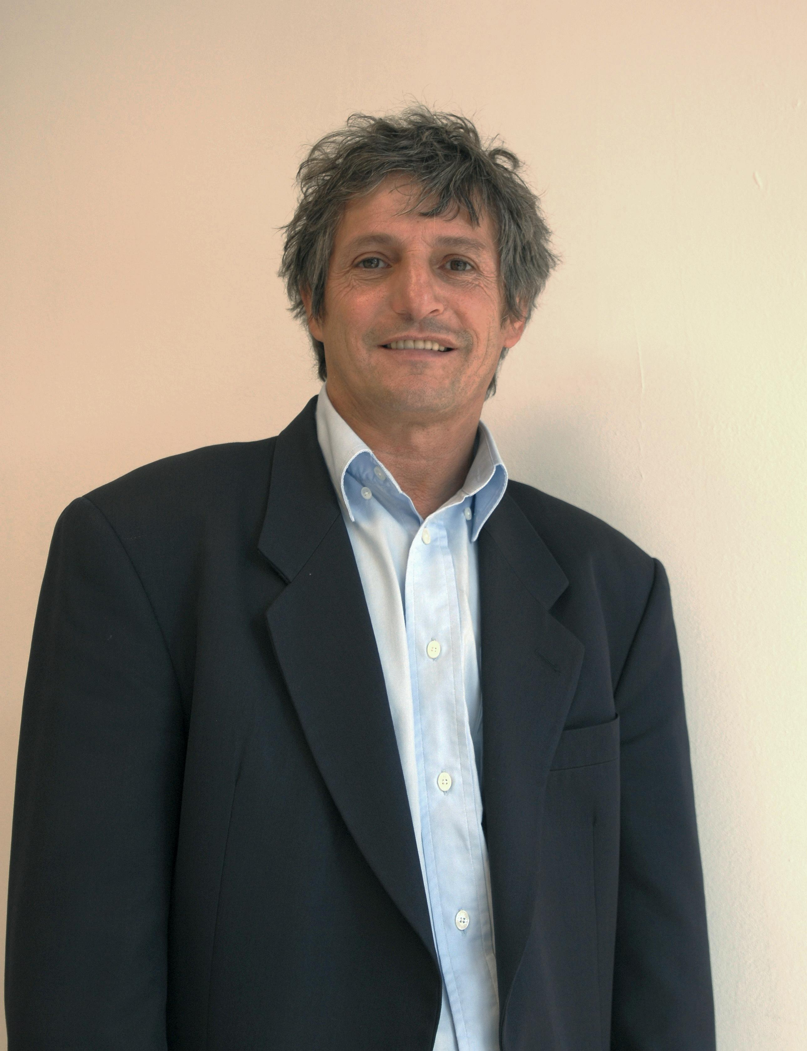 portrait de Didier Codorniou